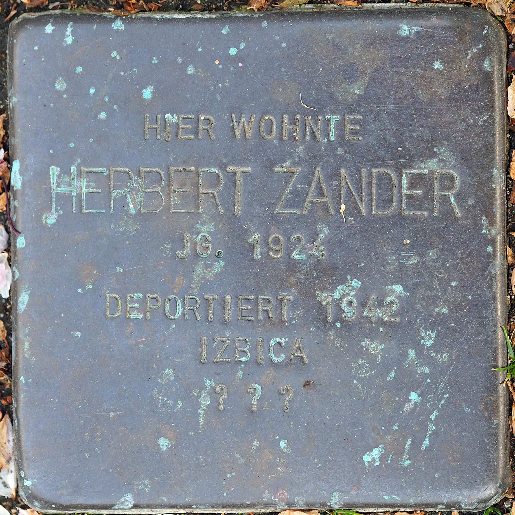 Stolpersteine MG: Zander, Herbert